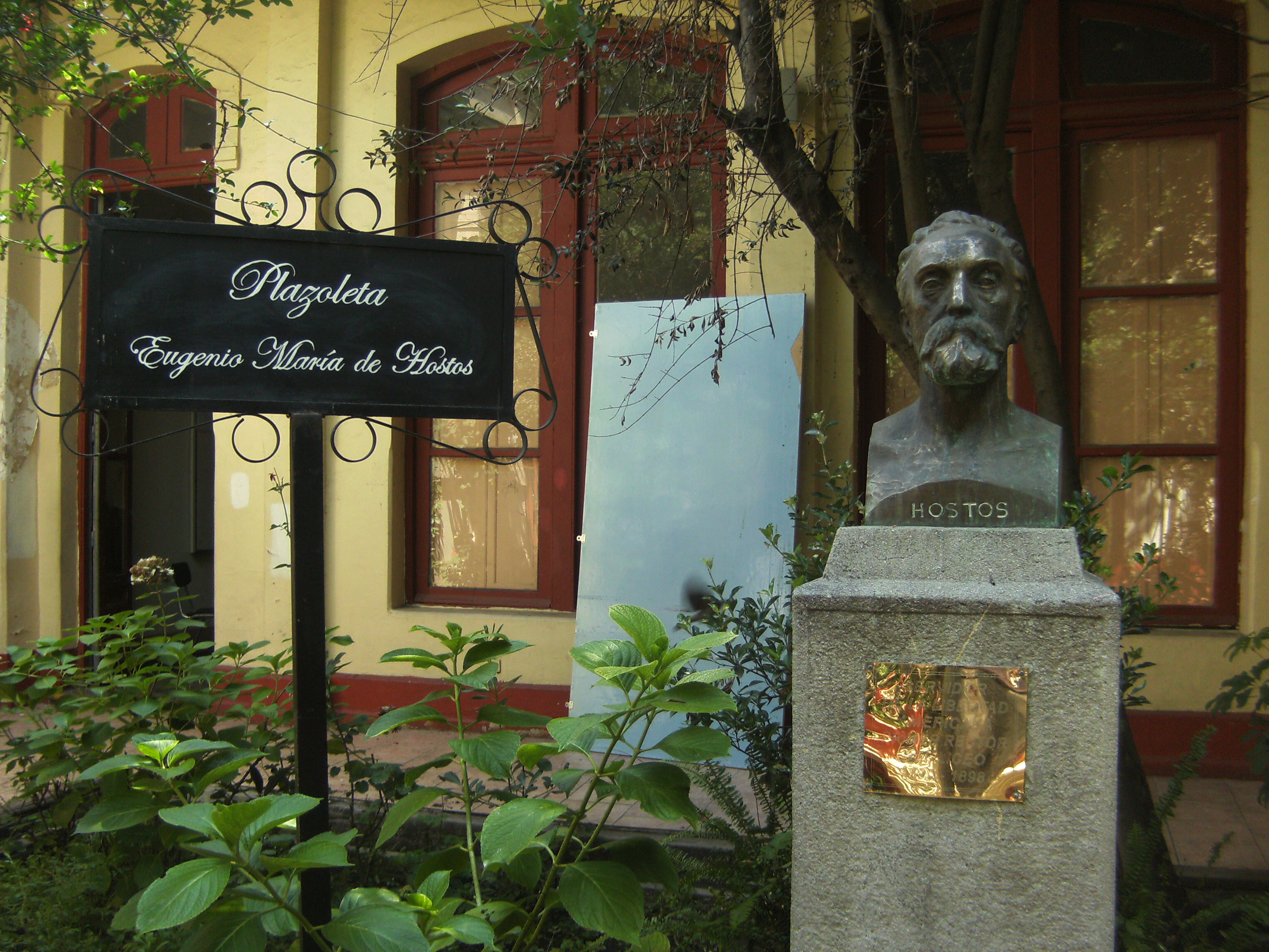 Visiones del liceo Amunátegui del Barrio Yungay en Santiago de Chile